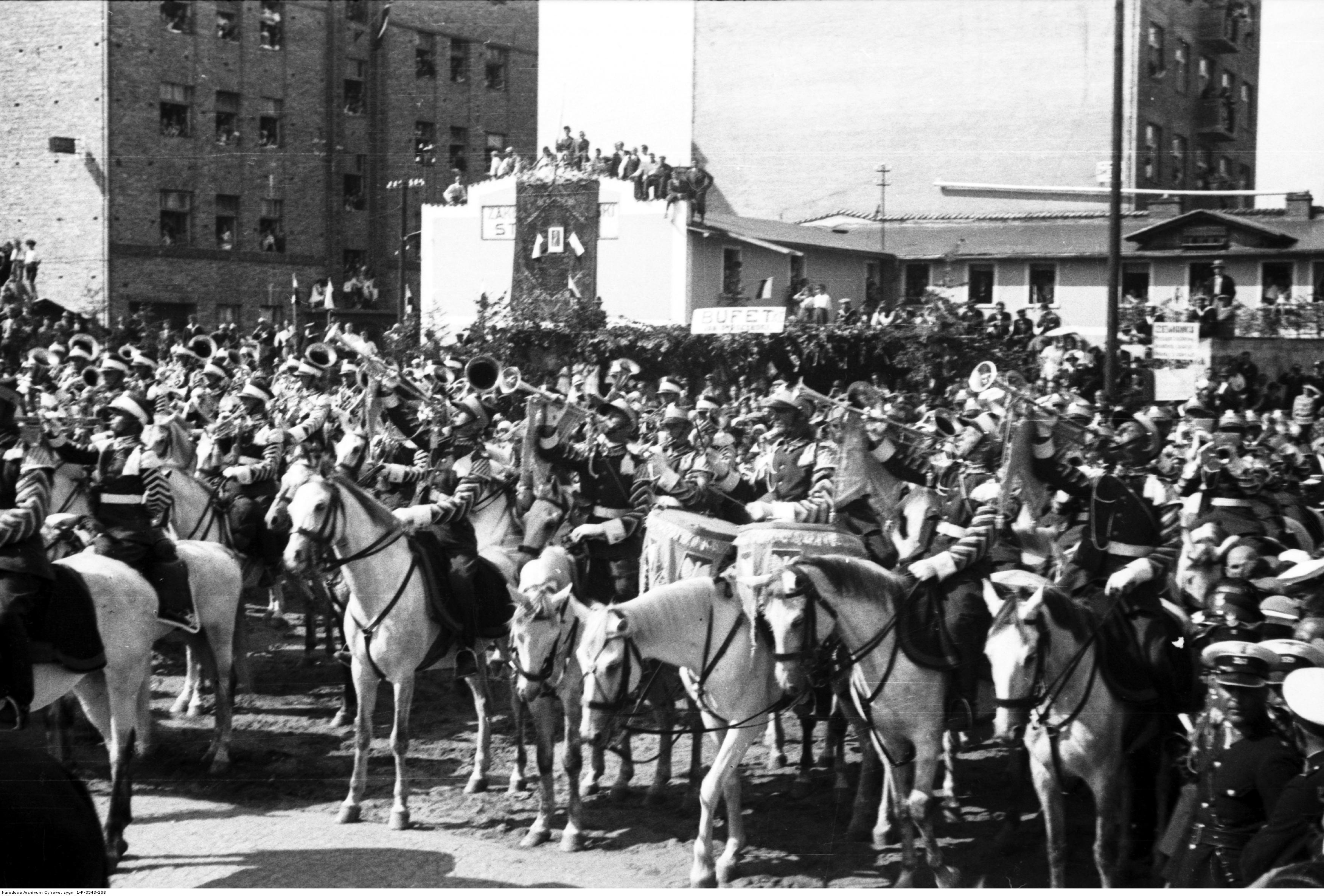 Obchody Święta Morza w Gdyni 31 lipca 1932. Orkiestra 18-go Pułku Ułanów Pomorskich podczas grania fanfar. Koncern Ilustrowany Kurier Codzienny - Archiwum Ilustracji. Sygnatura: 1-P-3543-108